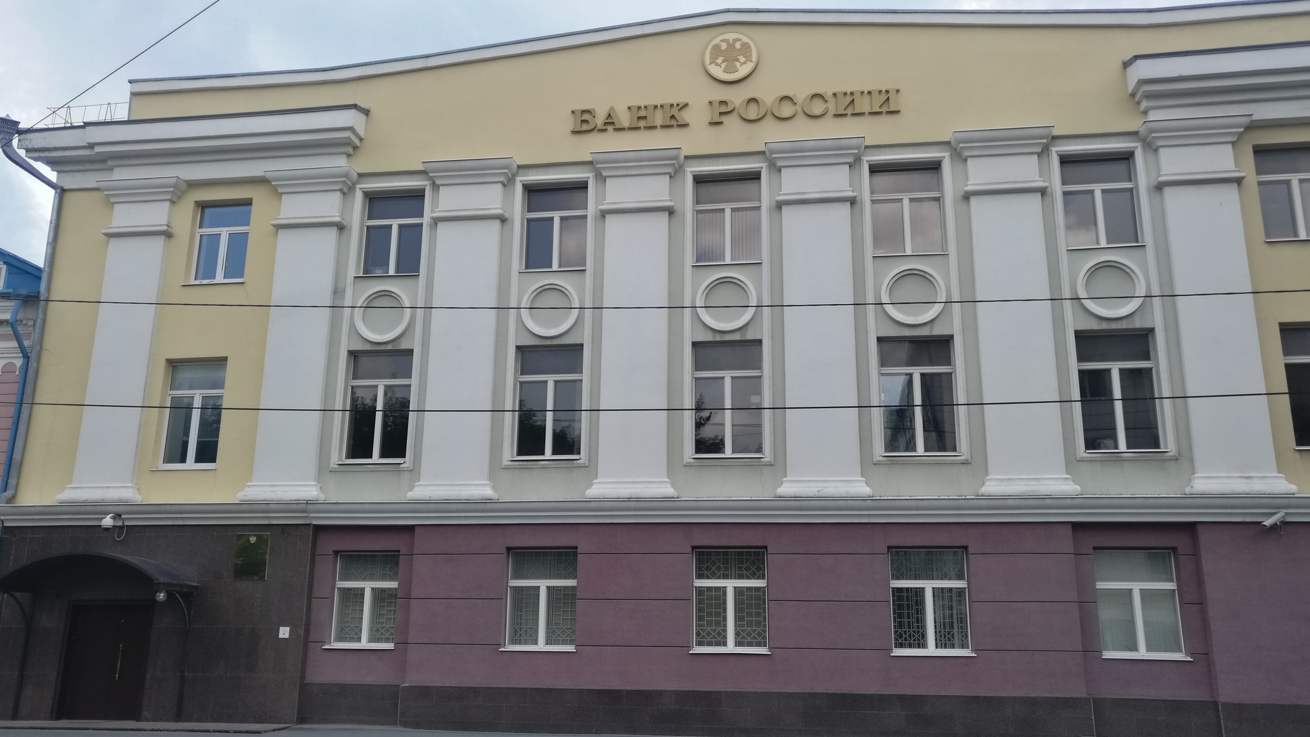 Banko de Rusio. Tjumeno, Rusio.